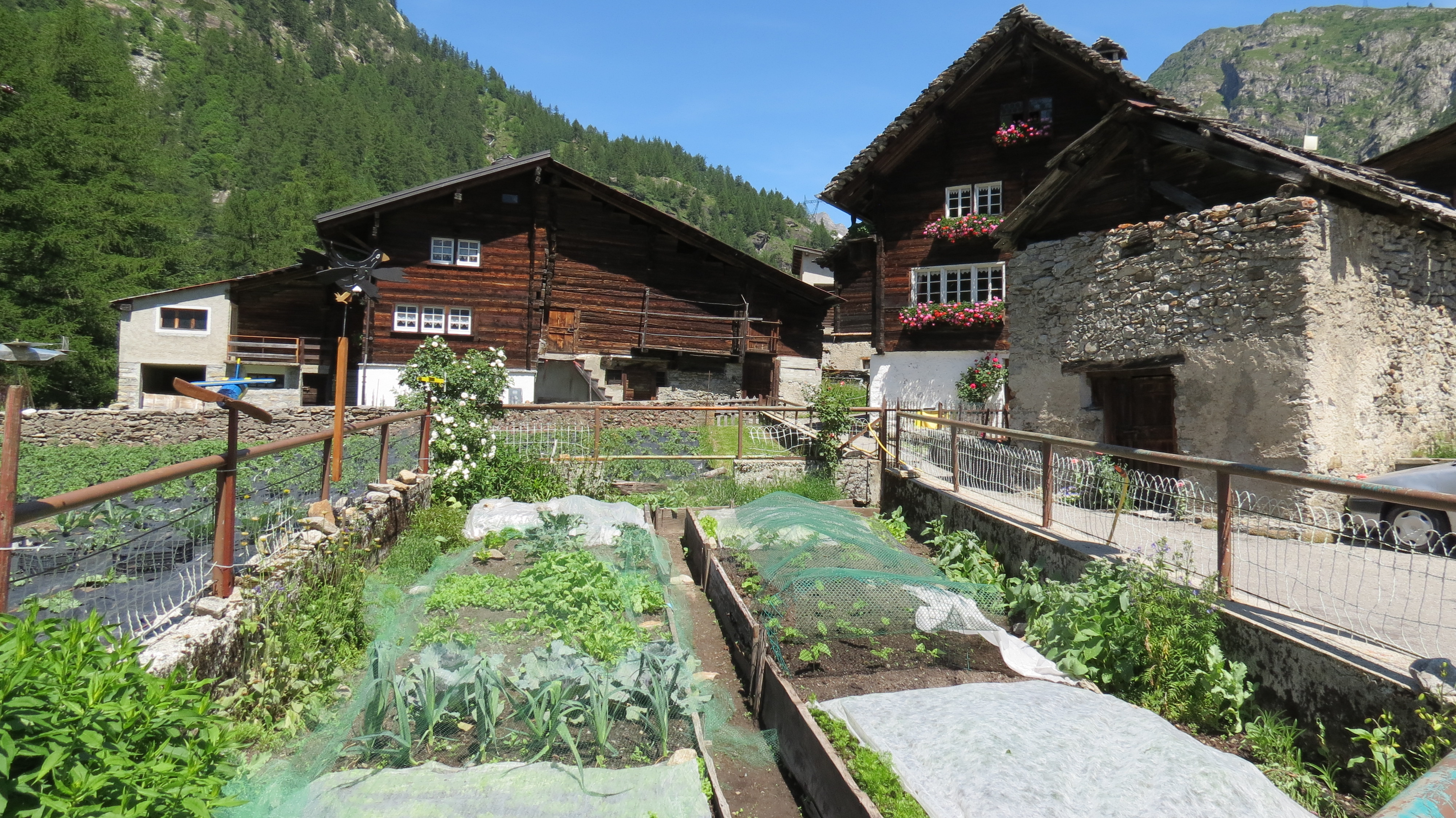 Häusergruppe im Weiler Fruduwald/Canza, Pomatt/Formazza